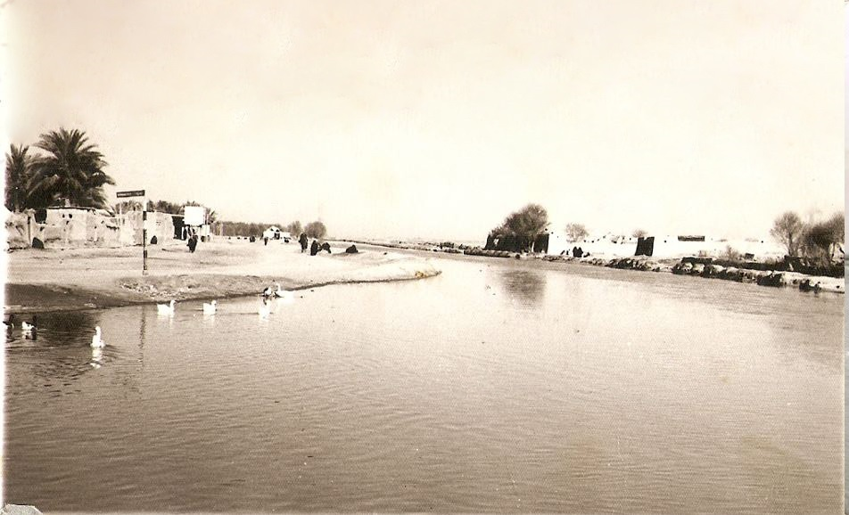 صورة لنهر الغراف في السبعينات